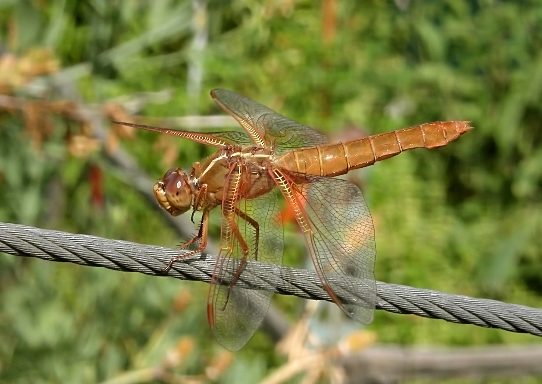 Female flame skimmer (Libellula saturata). Picture taken in Lodi, CA USA.